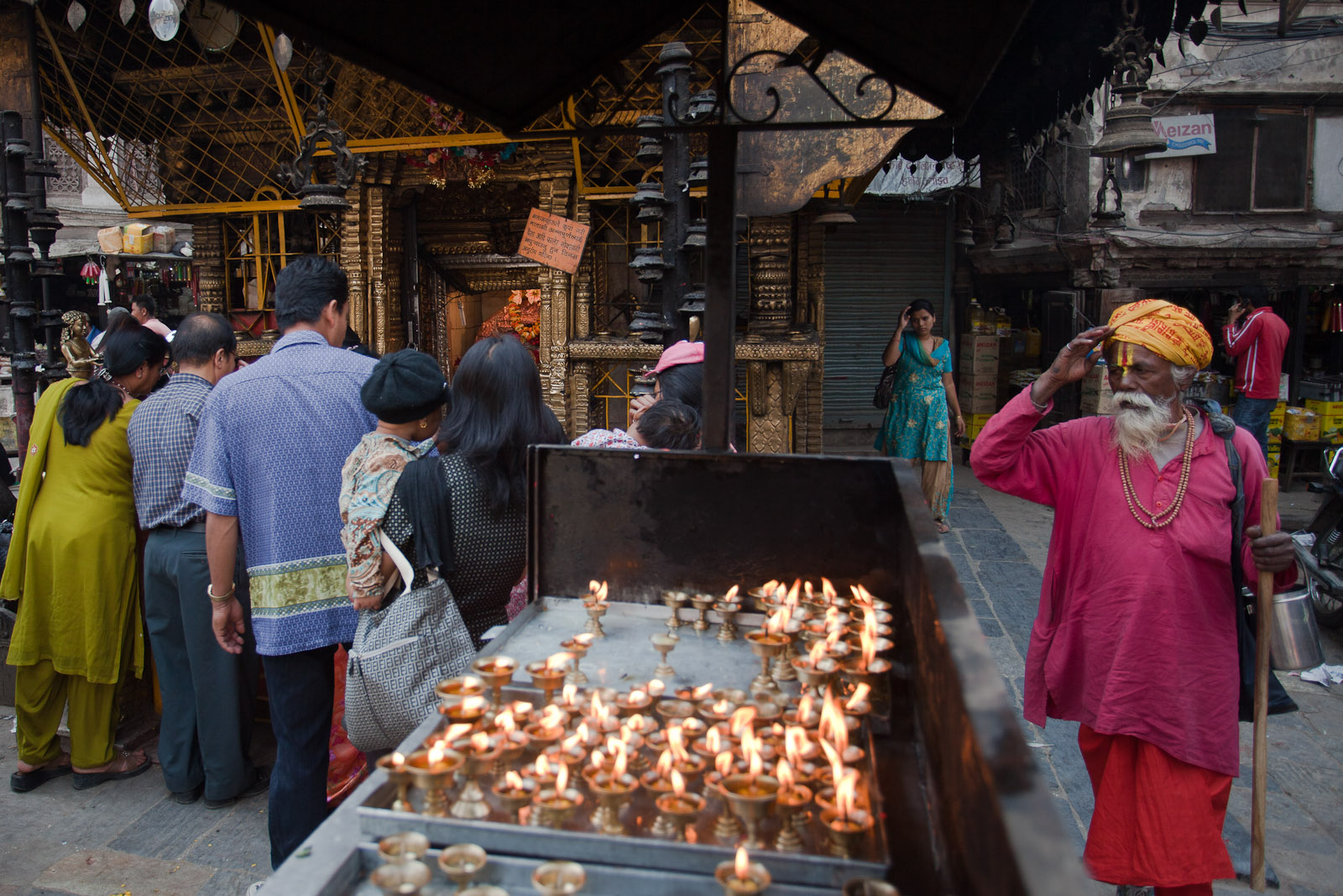 Asan Tole, Kathmandu